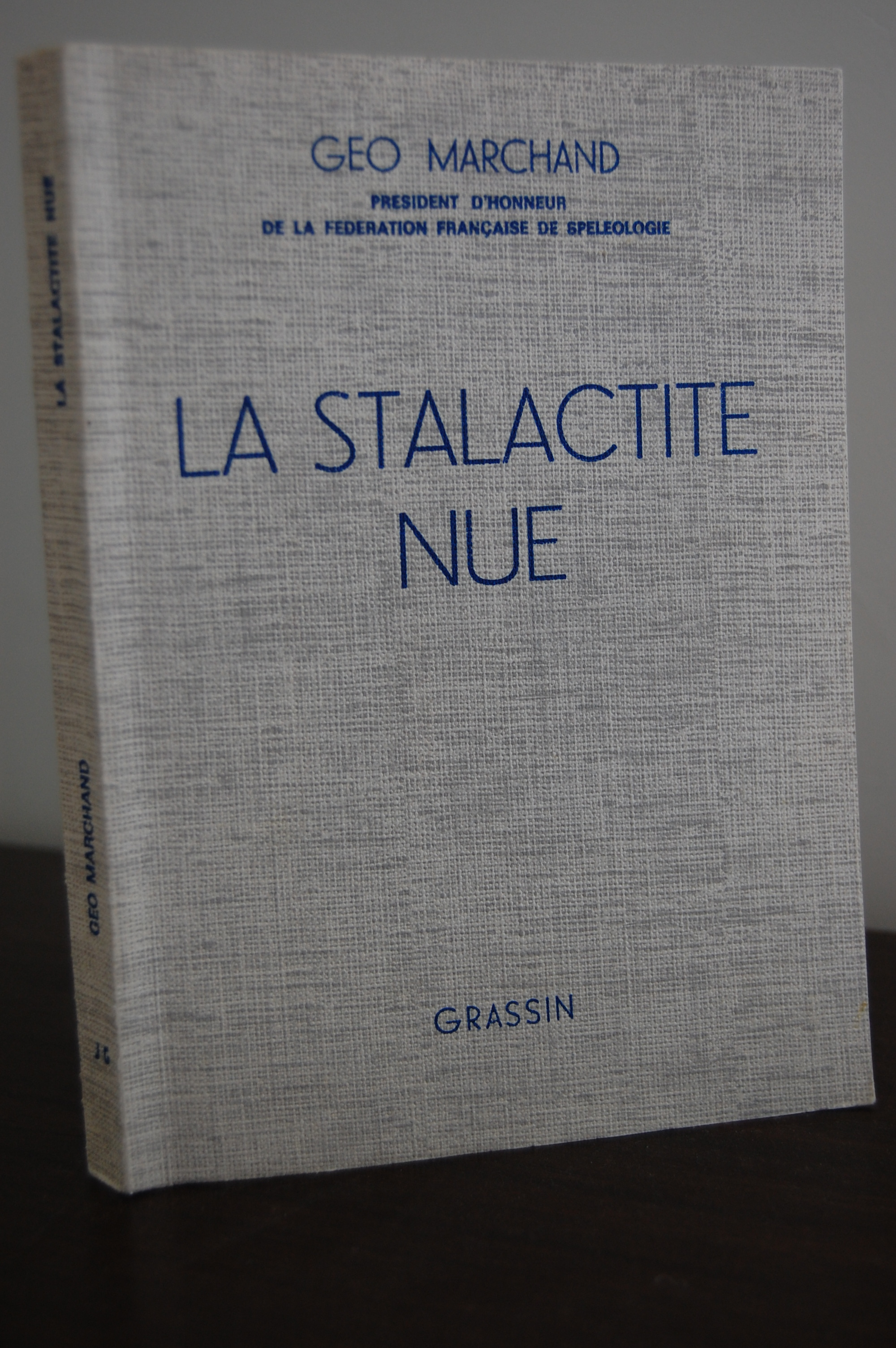 livre la stalactite nue, oeuvre de Géo Marchand